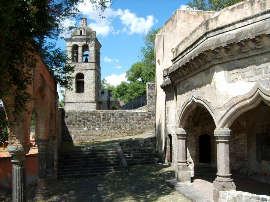 Capilla abierta y campanario del ex convento de San Francisco de Asís. Tlaxcala, México.